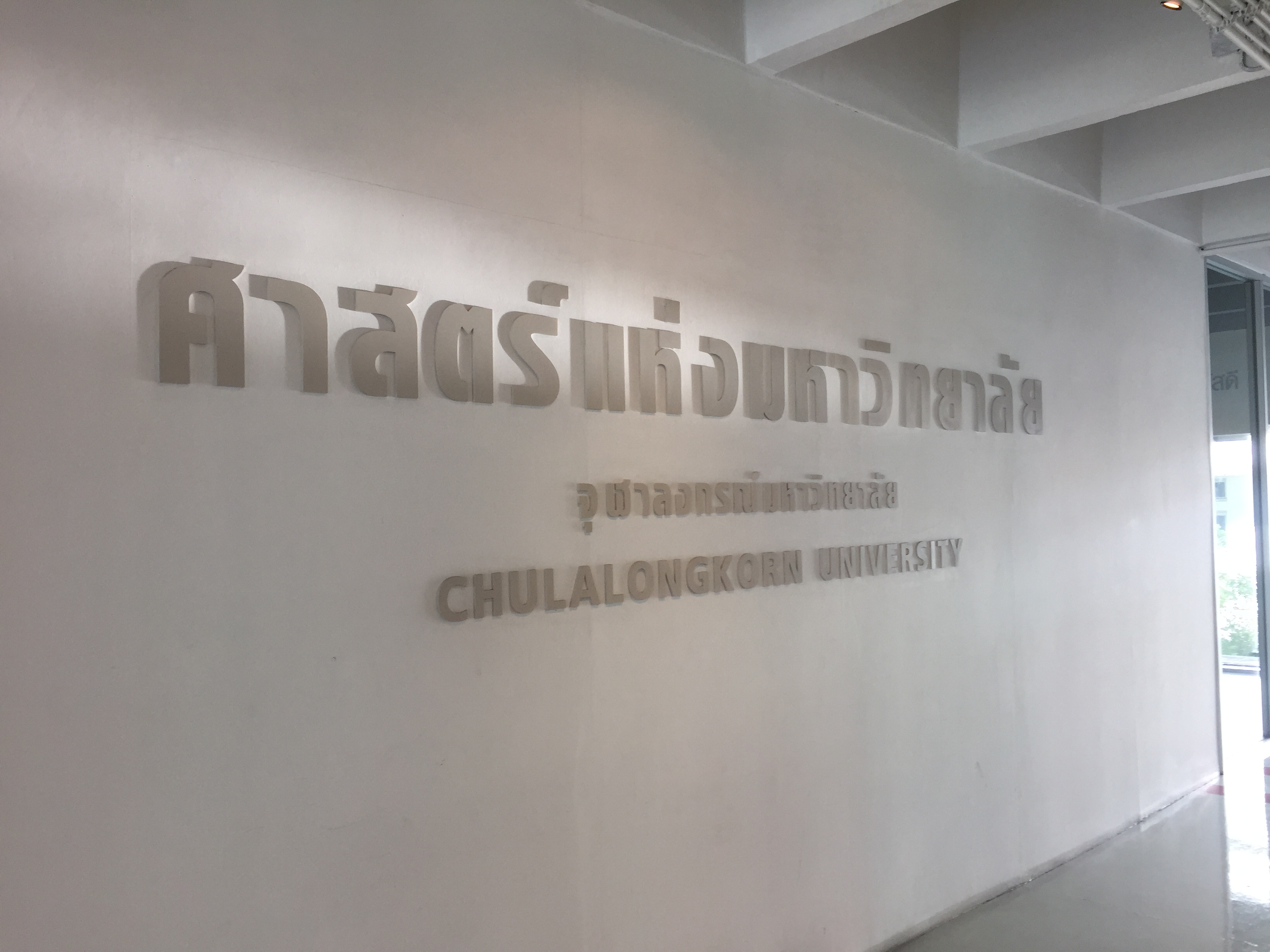 ด้านหน้าห้องจัดแสดงชั้นที่ 2